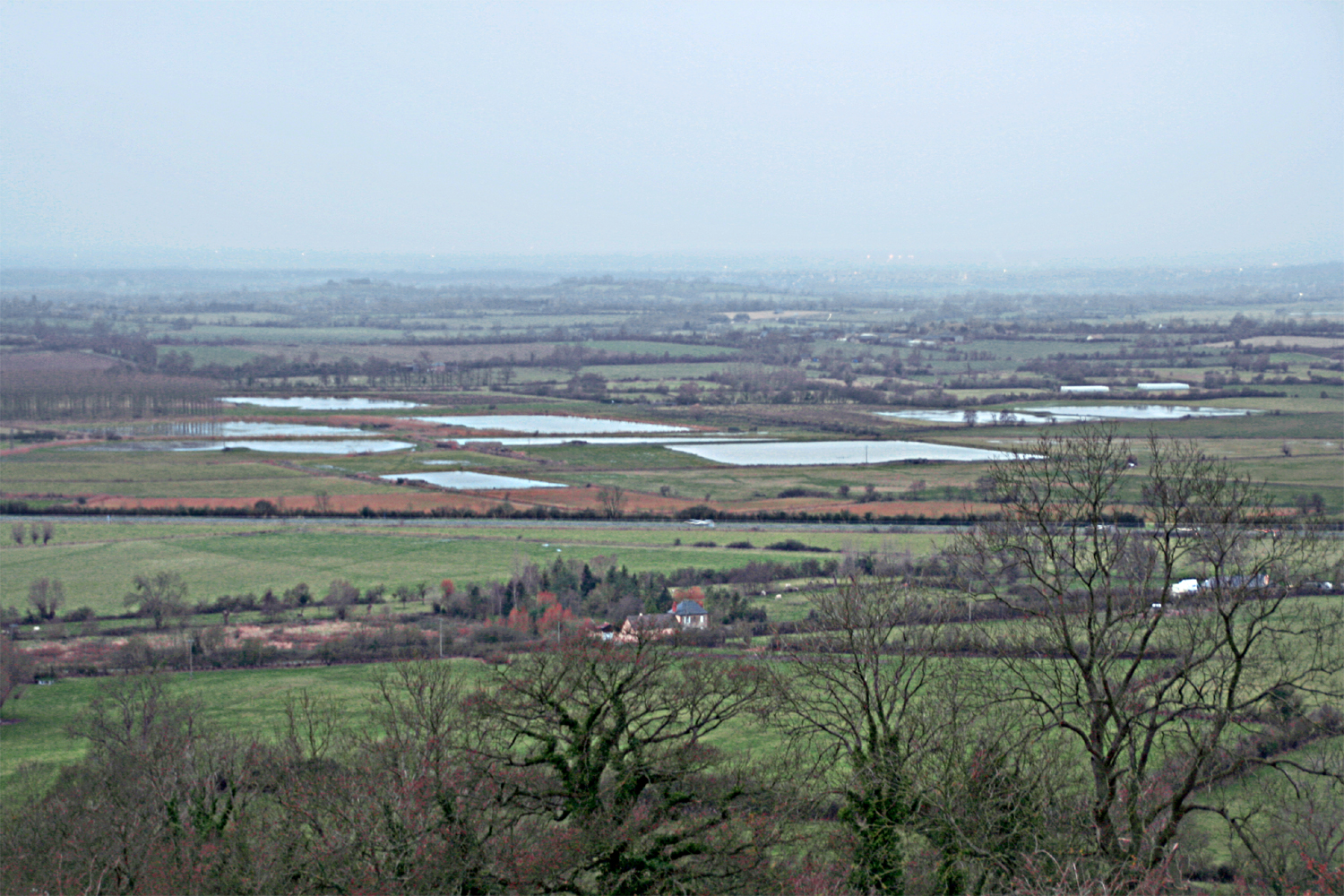 les marais de Brucourt vu depuis Bassebourg